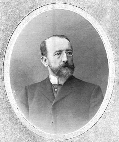 Retrato de Joaquín Ruiz Jiménez, obra de Manuel Compañy, recogido en la revista española La Ilustración Española y Americana.